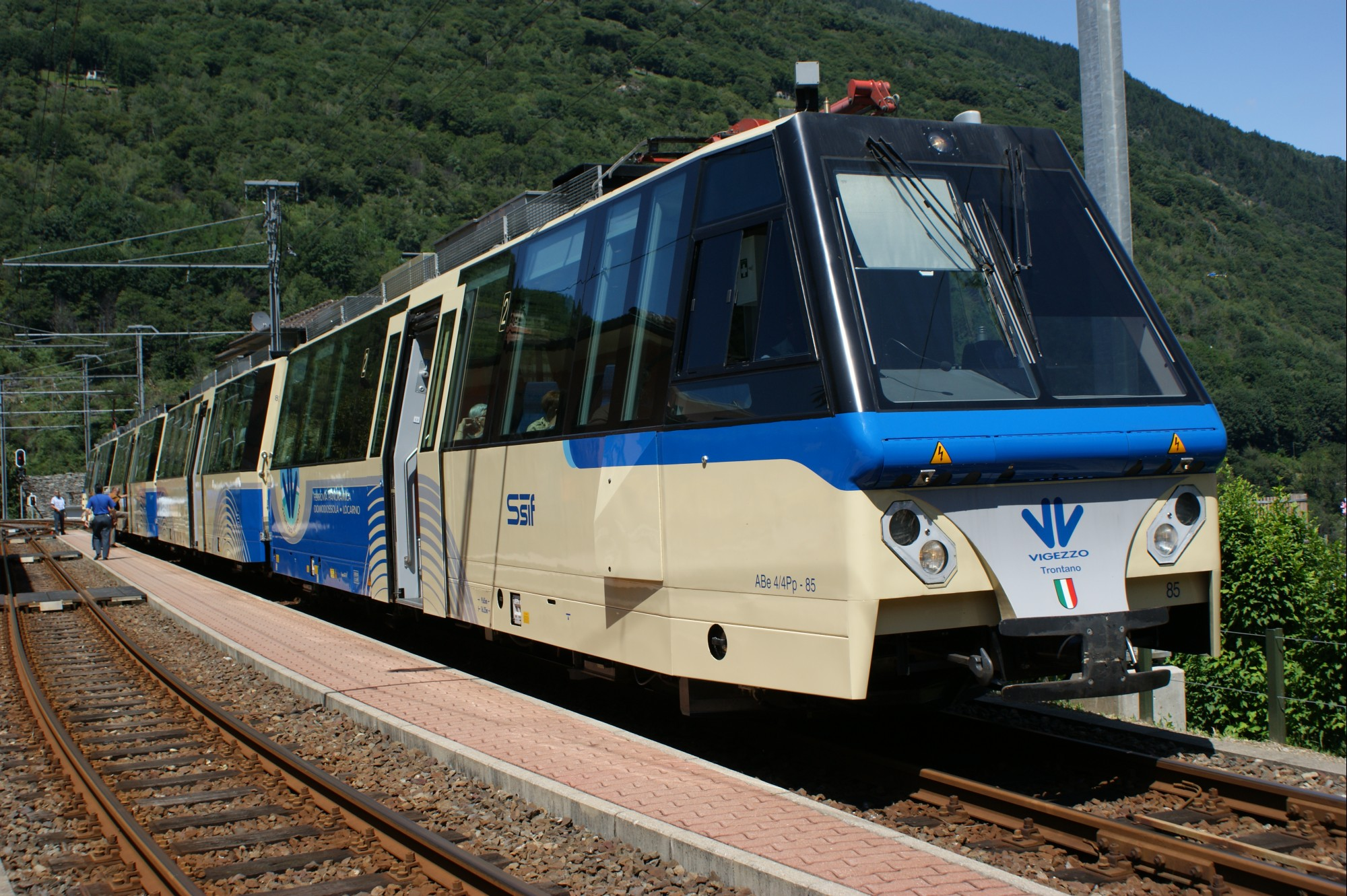 SSIF Zweitklasstriebwagen ABe 4/4Pp 85 an der Spitze eines Zuges mit den Fahrzeugen 89, 812 und 86 nach Domodossola in Intragna